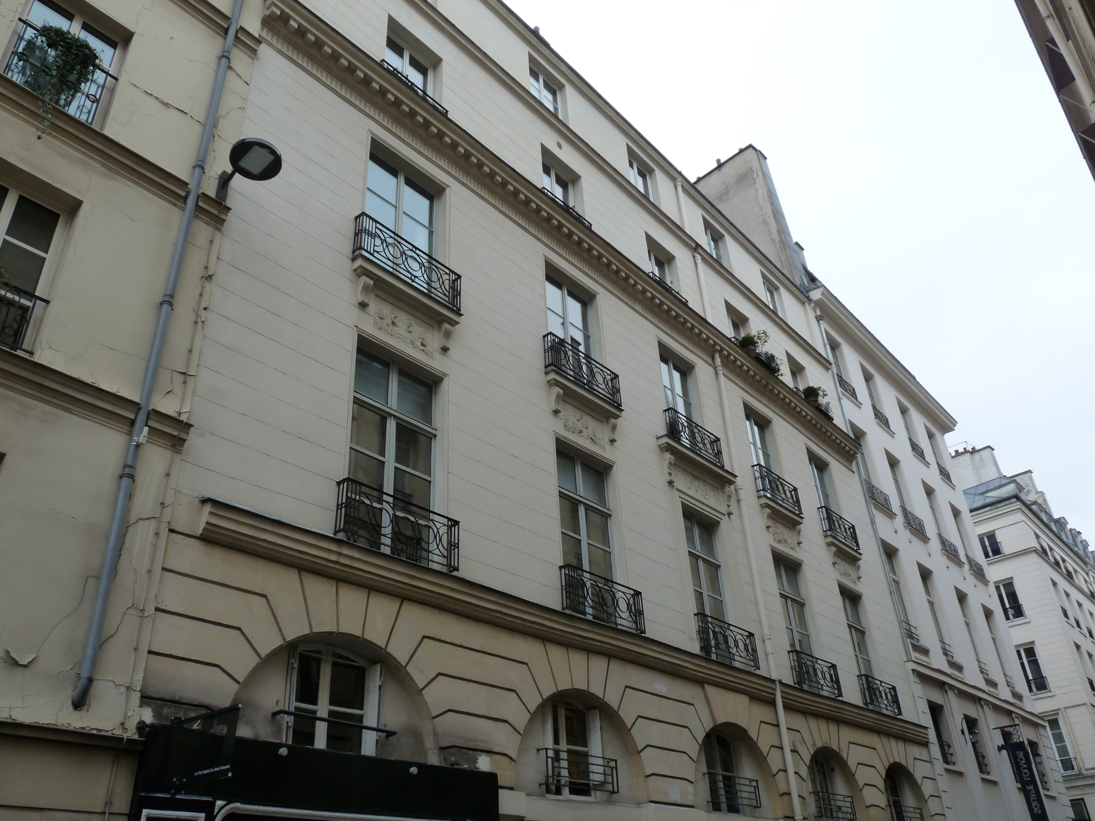 Immeuble où habitait Janie McCarthy à Paris.